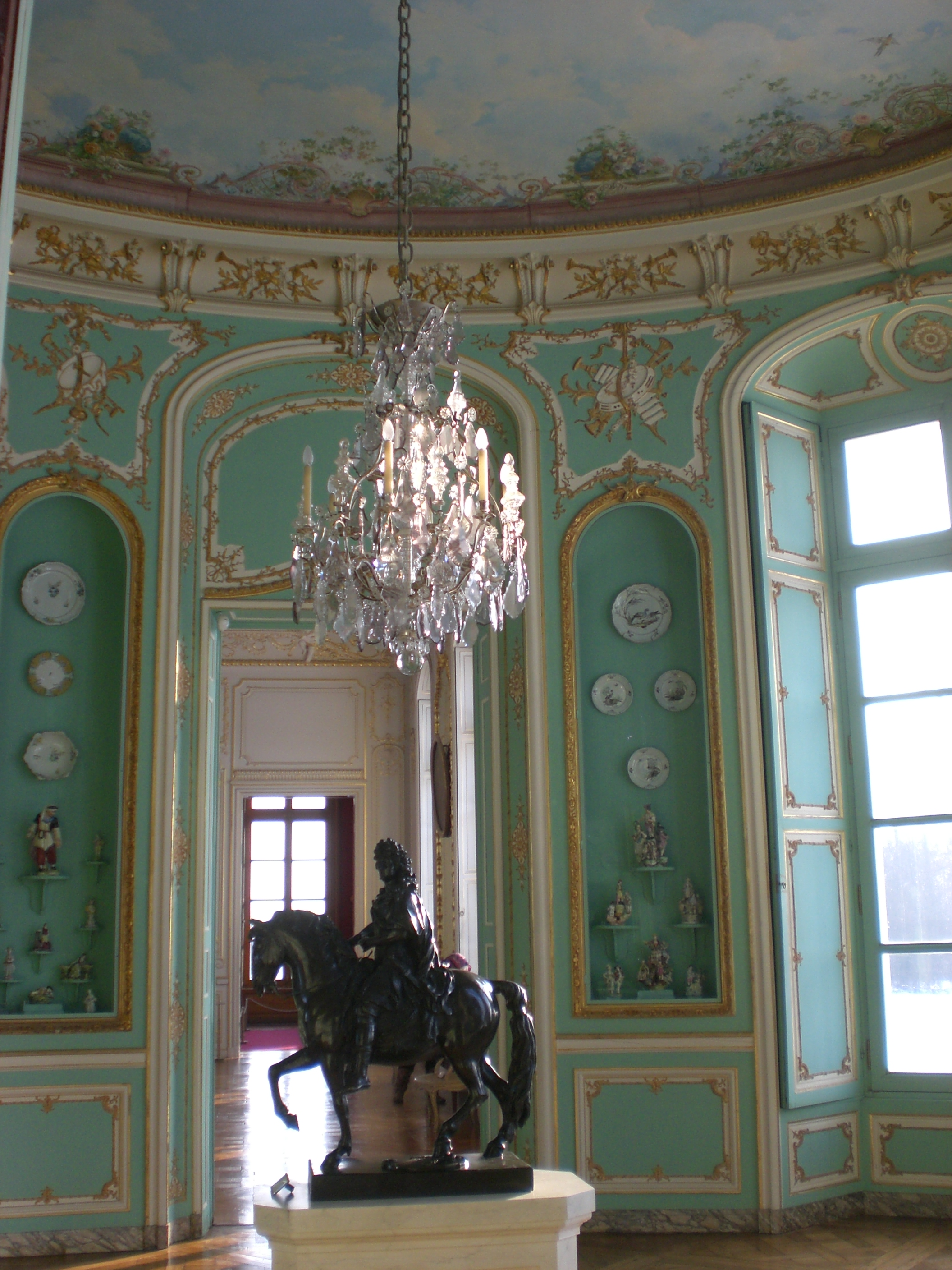 Sceaux, Salle de la Musique du Château